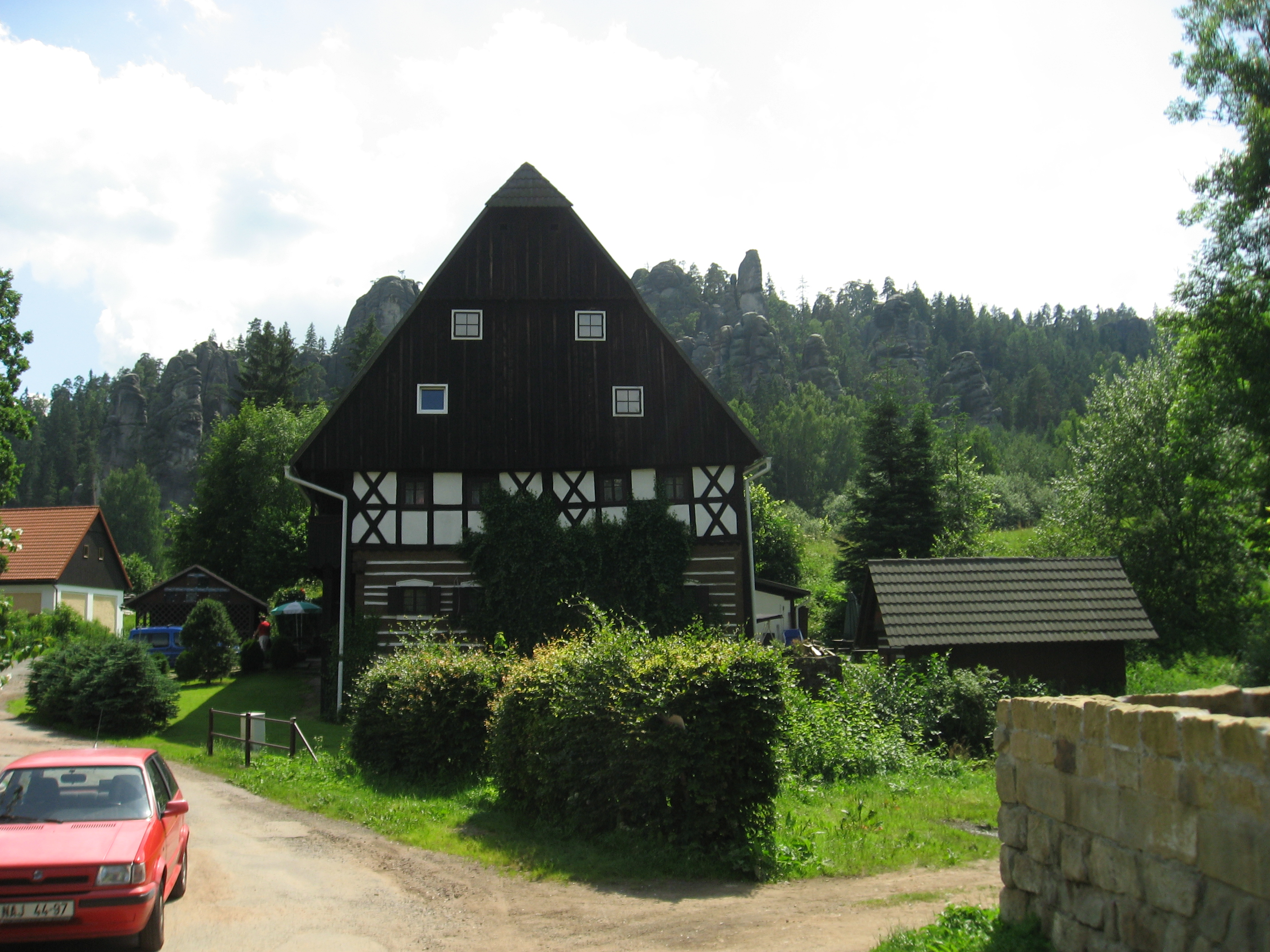 Adršpach